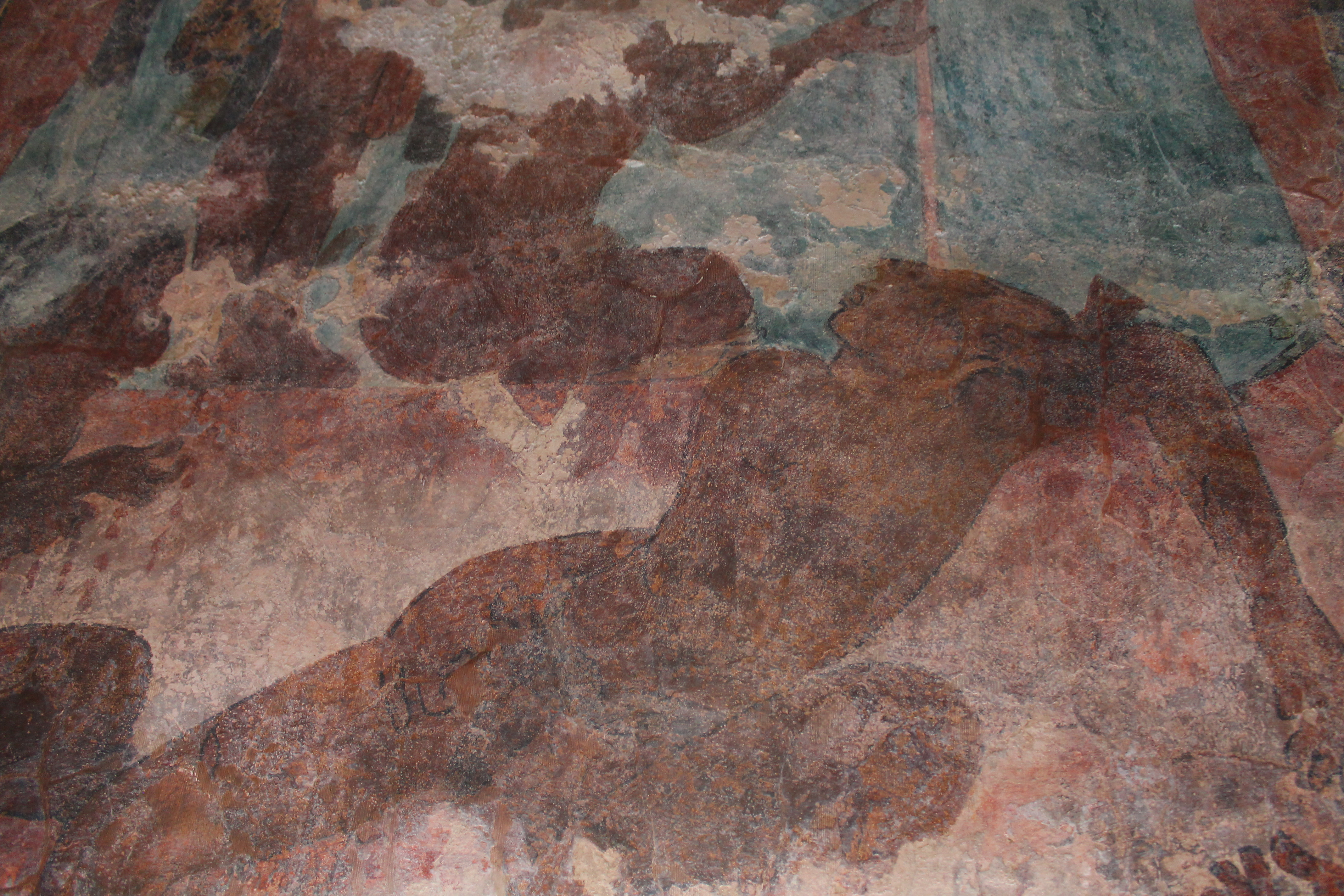 Pinturas ancestrales en mítica zona arqueológica de Bonampak, Chiapas.